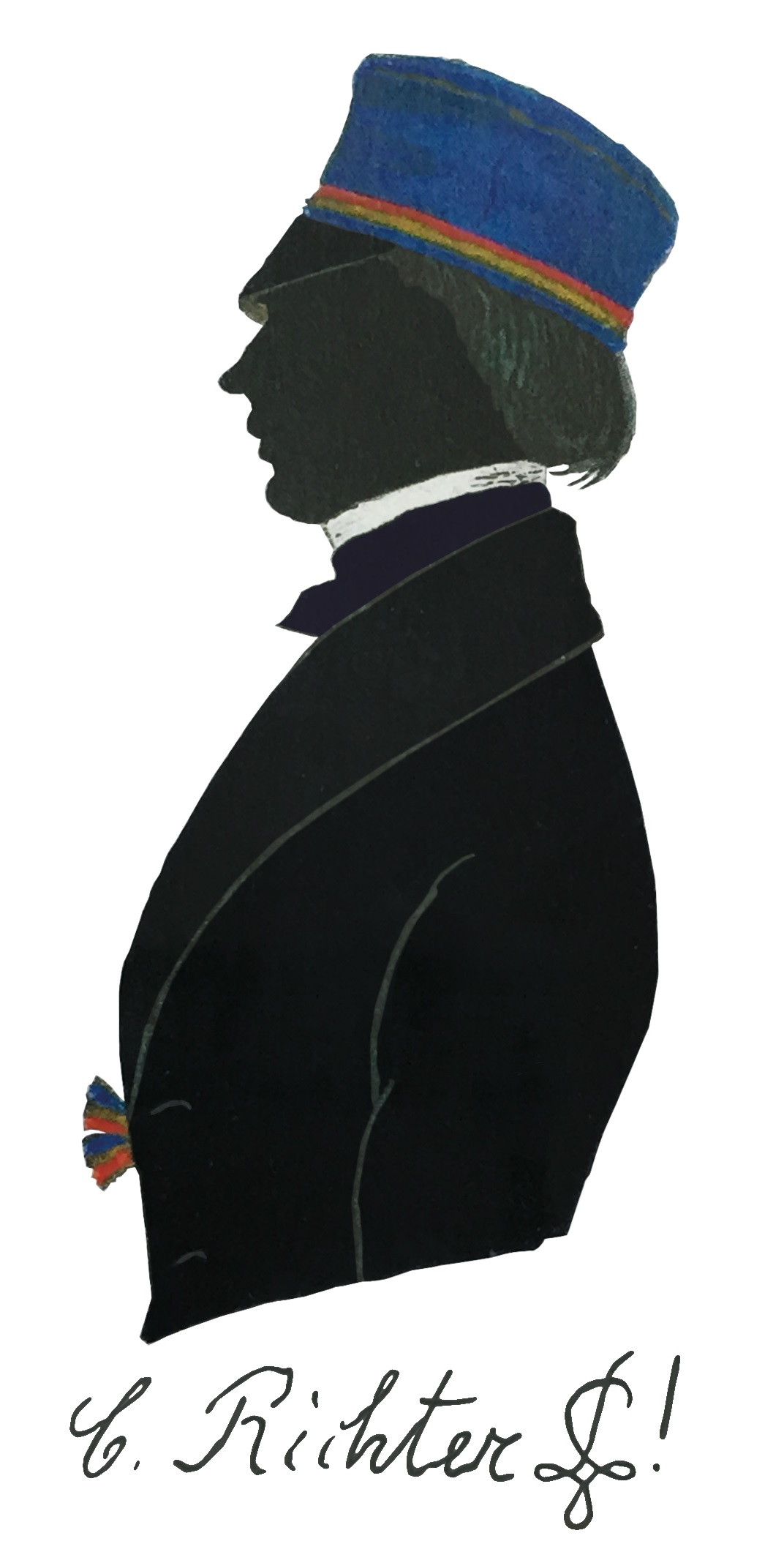 Silhouette von Constantin Richter als Student in Leipzig